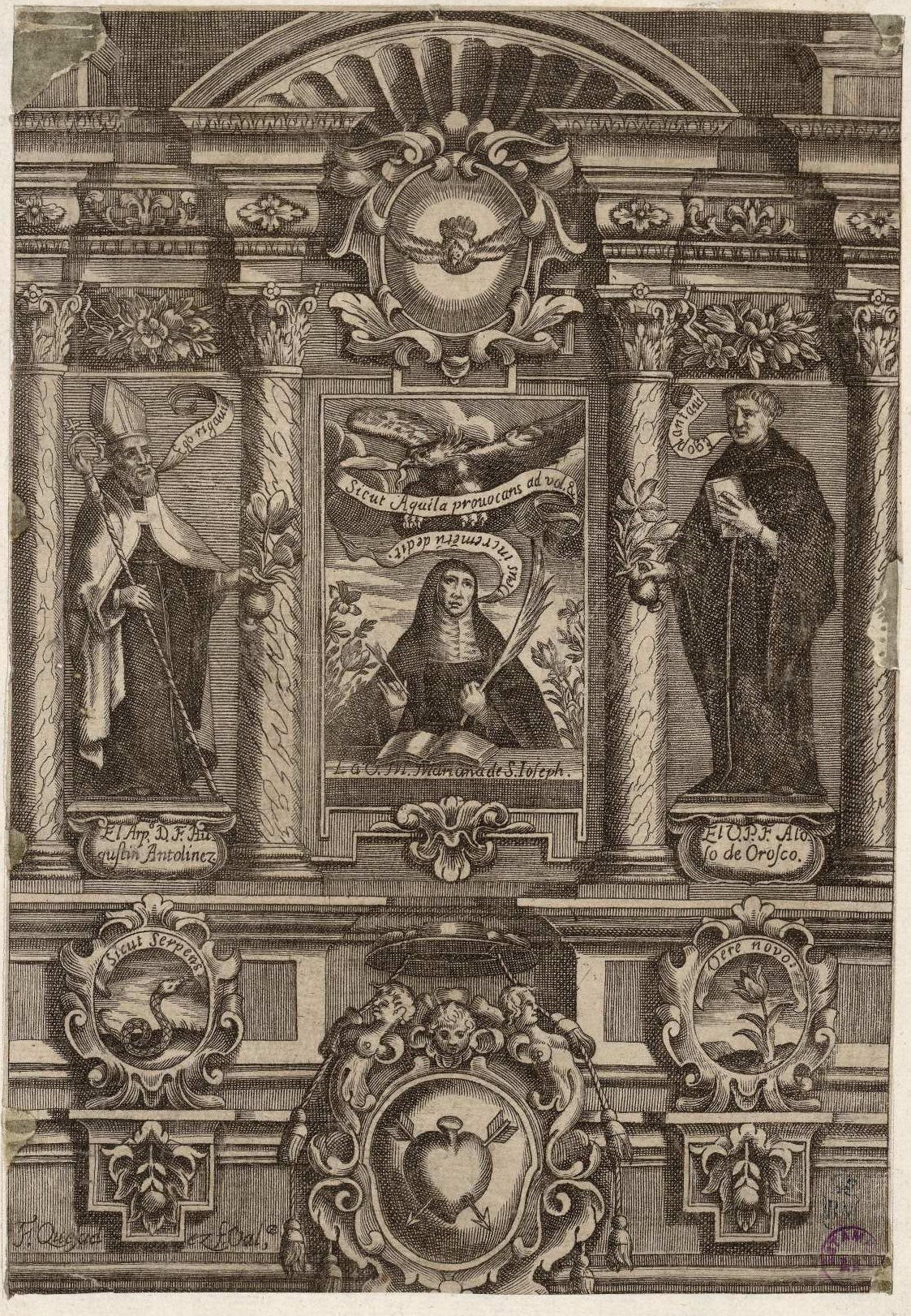 La venerable madre Mariana de San José en portada-retablo flanqueada por el arzobispo Agustín Antolínez y el beato Alonso de Orozco. Buril firmado en Valencia por Francisco Quesádez para una obra no identificada.